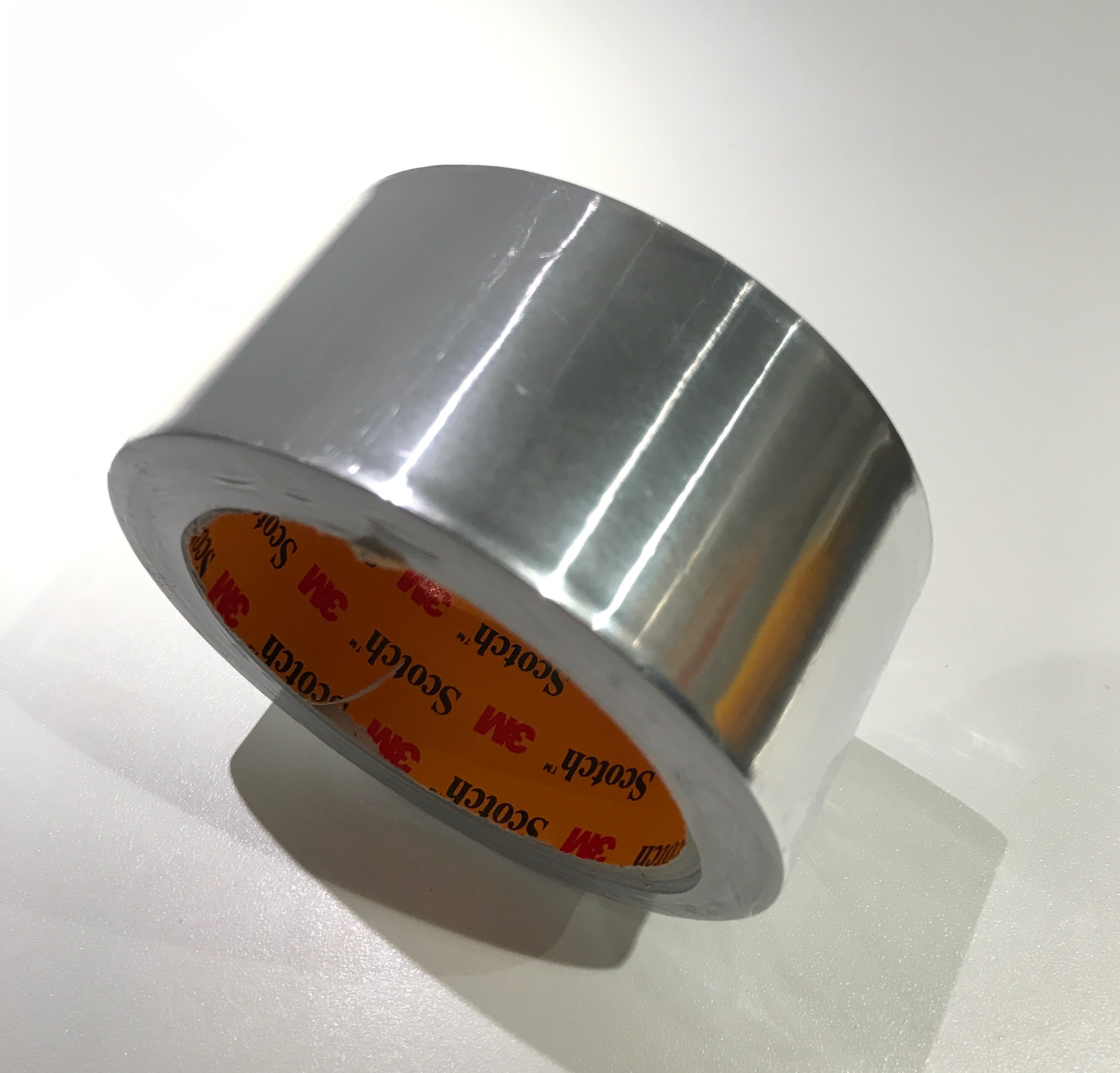 Alumiiniteippi, jota käytetään eritämiseen korkeissa lämpötiloissa tai ilmastointikanavien tiivistämiseen.